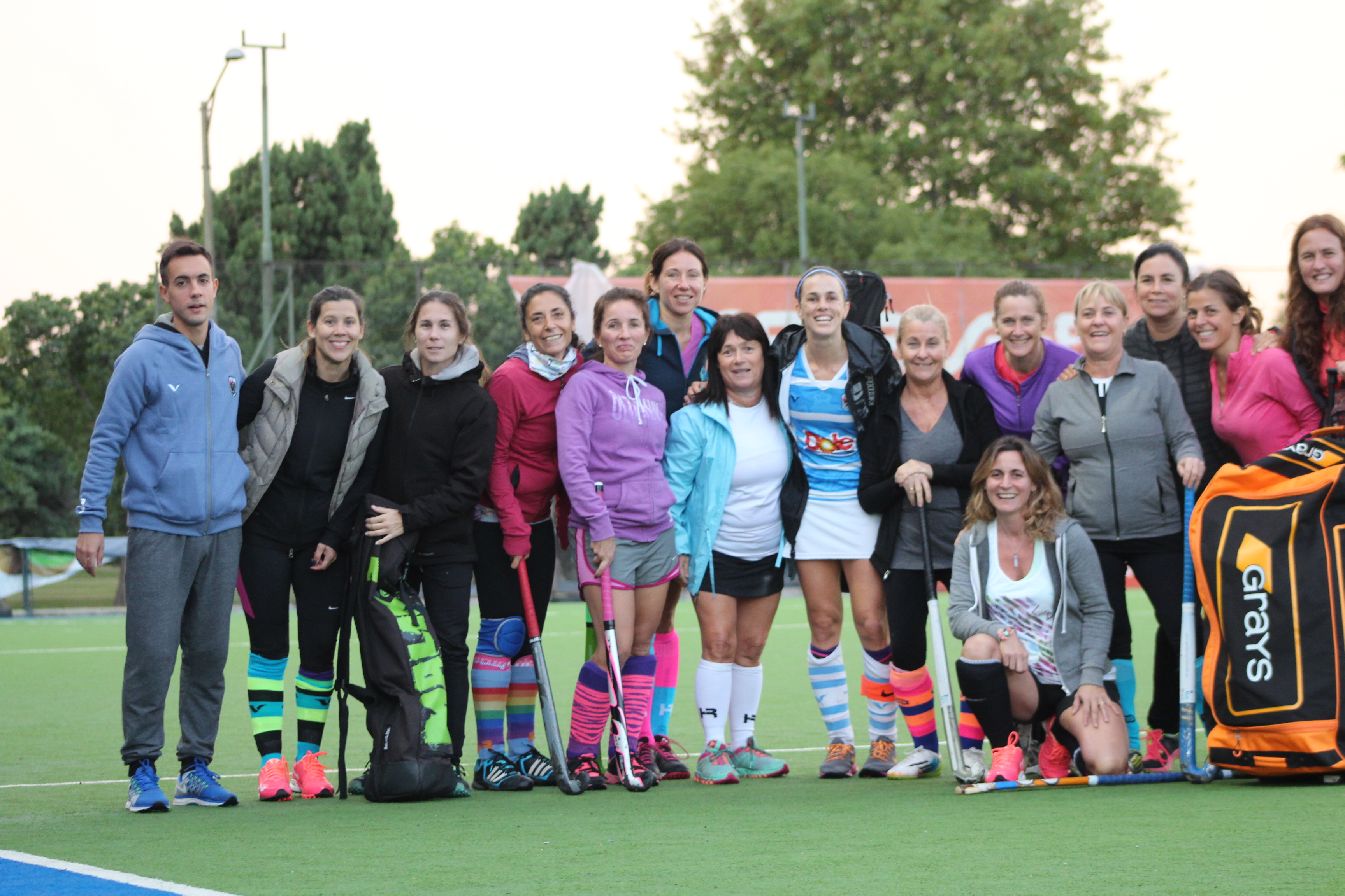 Mamis Hockey Ciudad 2017